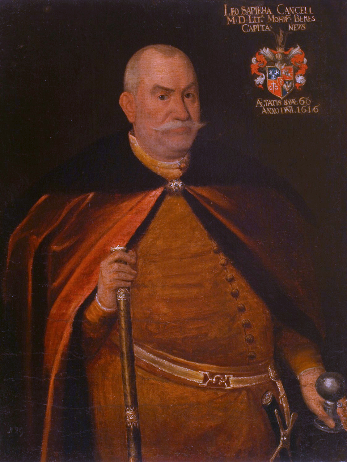 Lew Sapieha